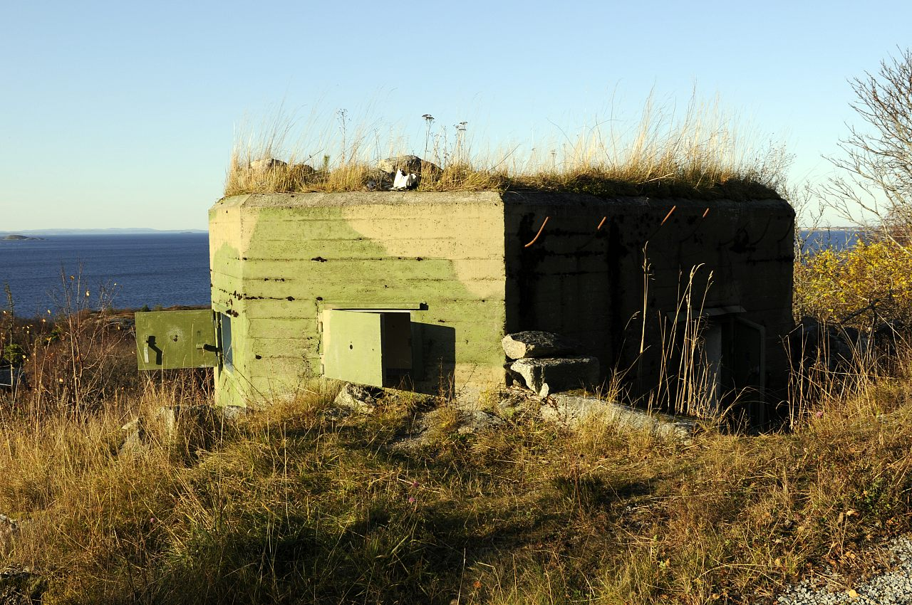 Nærforsvarsstilling ved Brettingen fort